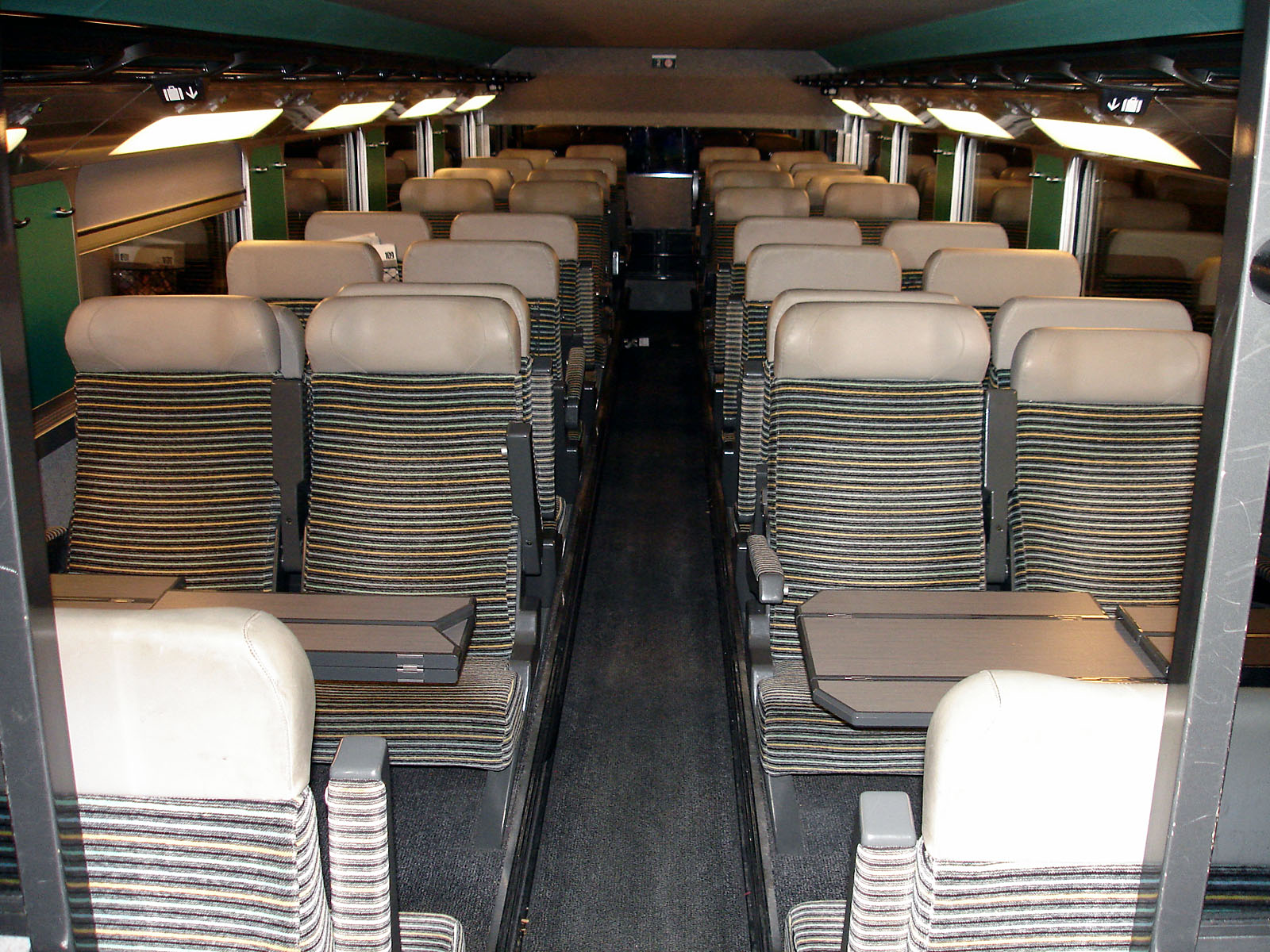 Salle basse d'une remorque de 2ème classe d'un TGV Duplex, France.